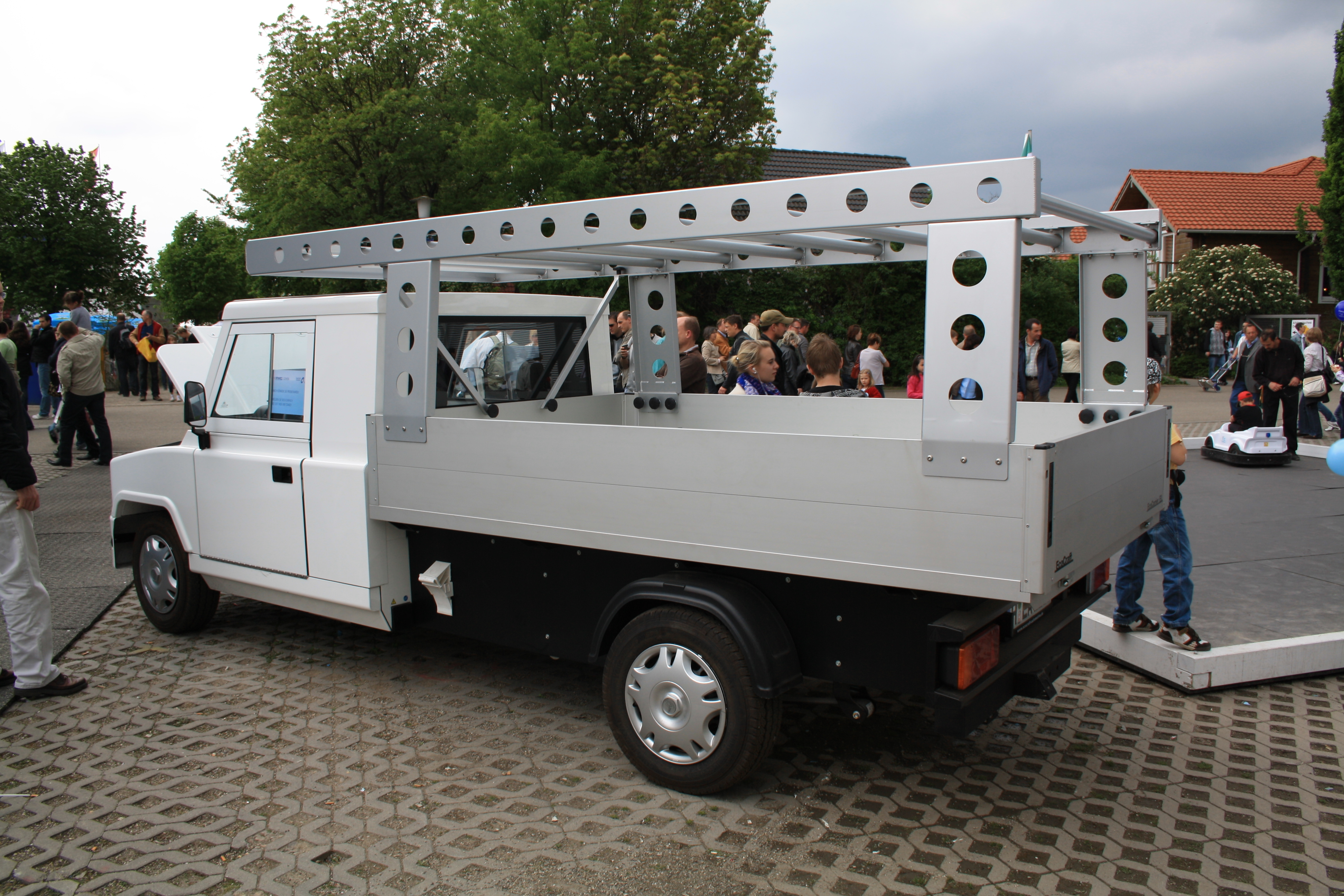 Der Ecocraft EL ist ein deutsches Elektroauto mit einer Ladekapazität von vier Europaletten auf der Pritsche. Die Aufnahme entstand am Stand Elektromobilität von RWE, Sixt und Renault auf dem Mannheimer Maimarkt.